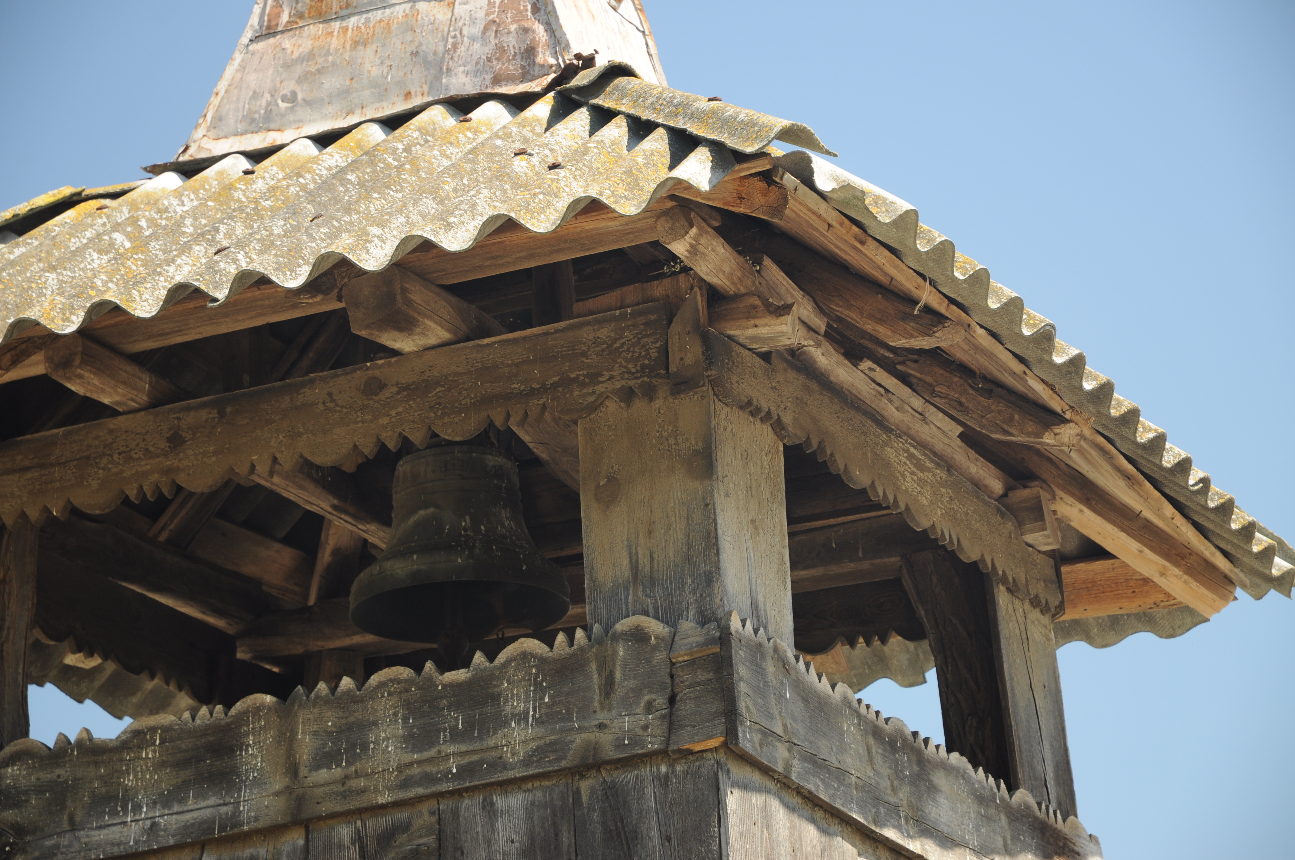 Biserica " Sf. Nicolae"